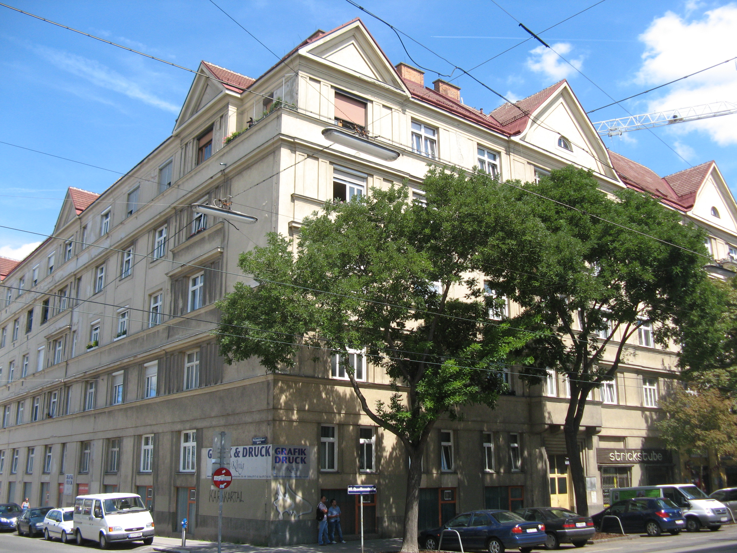 Zinshausblock (1914-15) von Adolf Oberländer, Quellenstraße 138-140, Wien-Favoriten